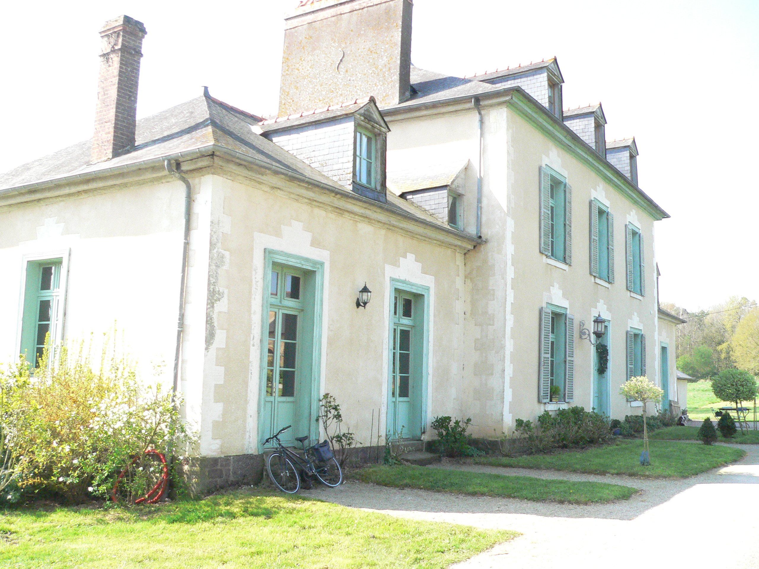 House